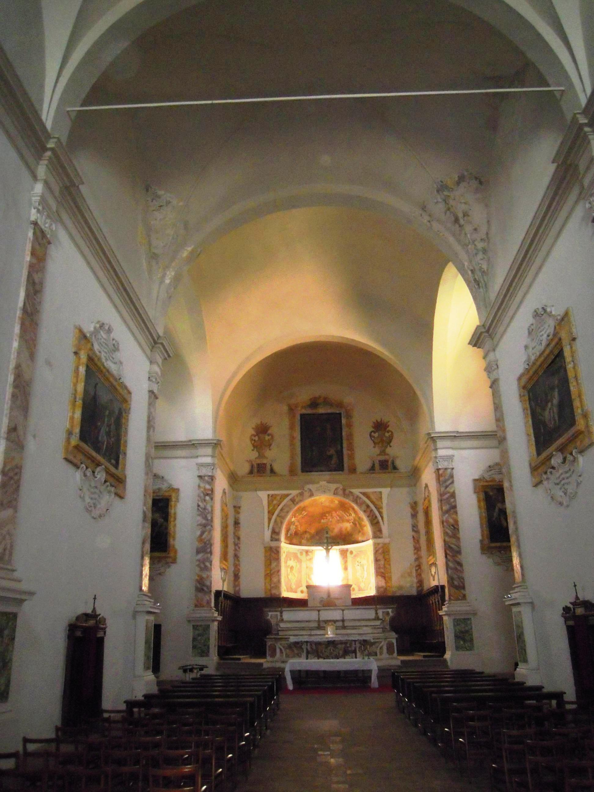 Monastero di Sant'Anna in Camprena, situato all'interno del comune di Pienza, in provincia di Siena, Toscana.